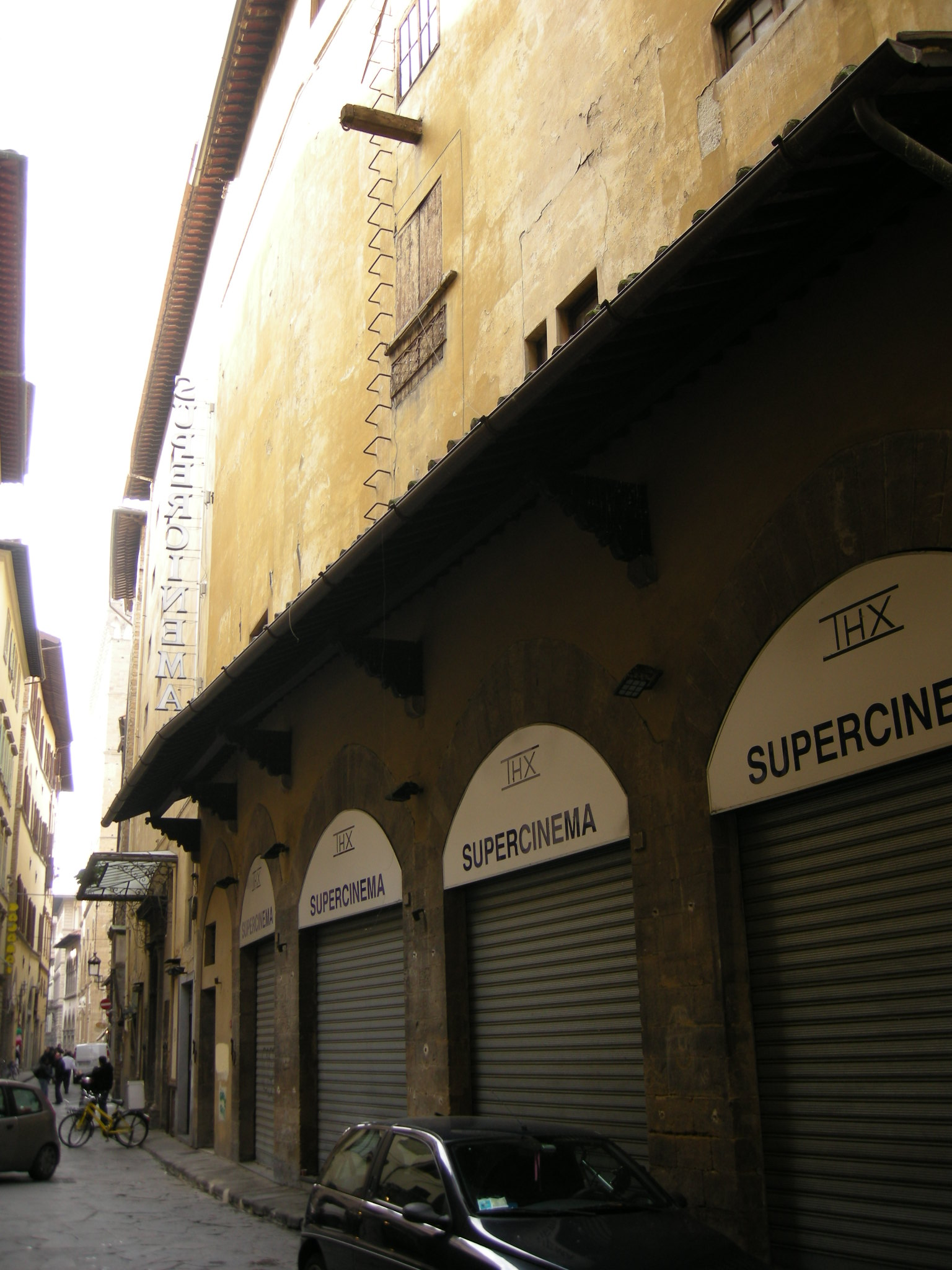 Supercinema